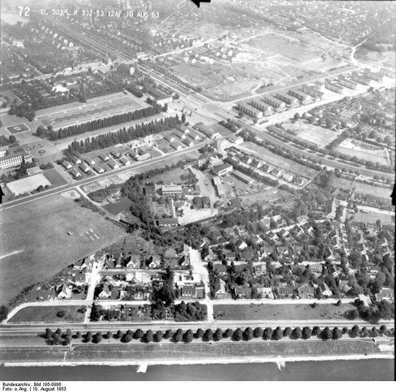 Rheinbefliegung der Alliierten 1953